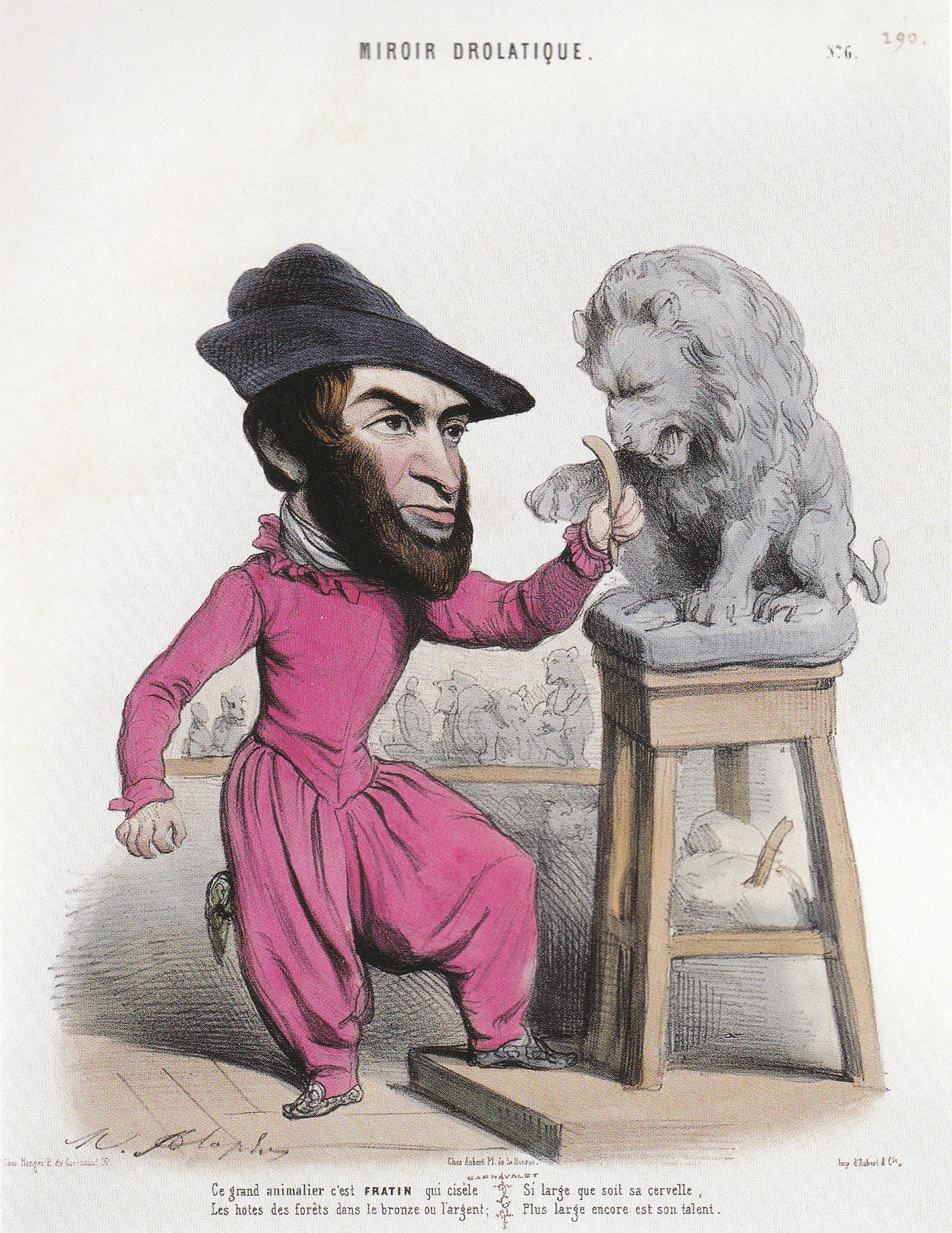 Lithographie du Miroire drolatique" représentant Fratin ciselant le Lion Combattant un serpent